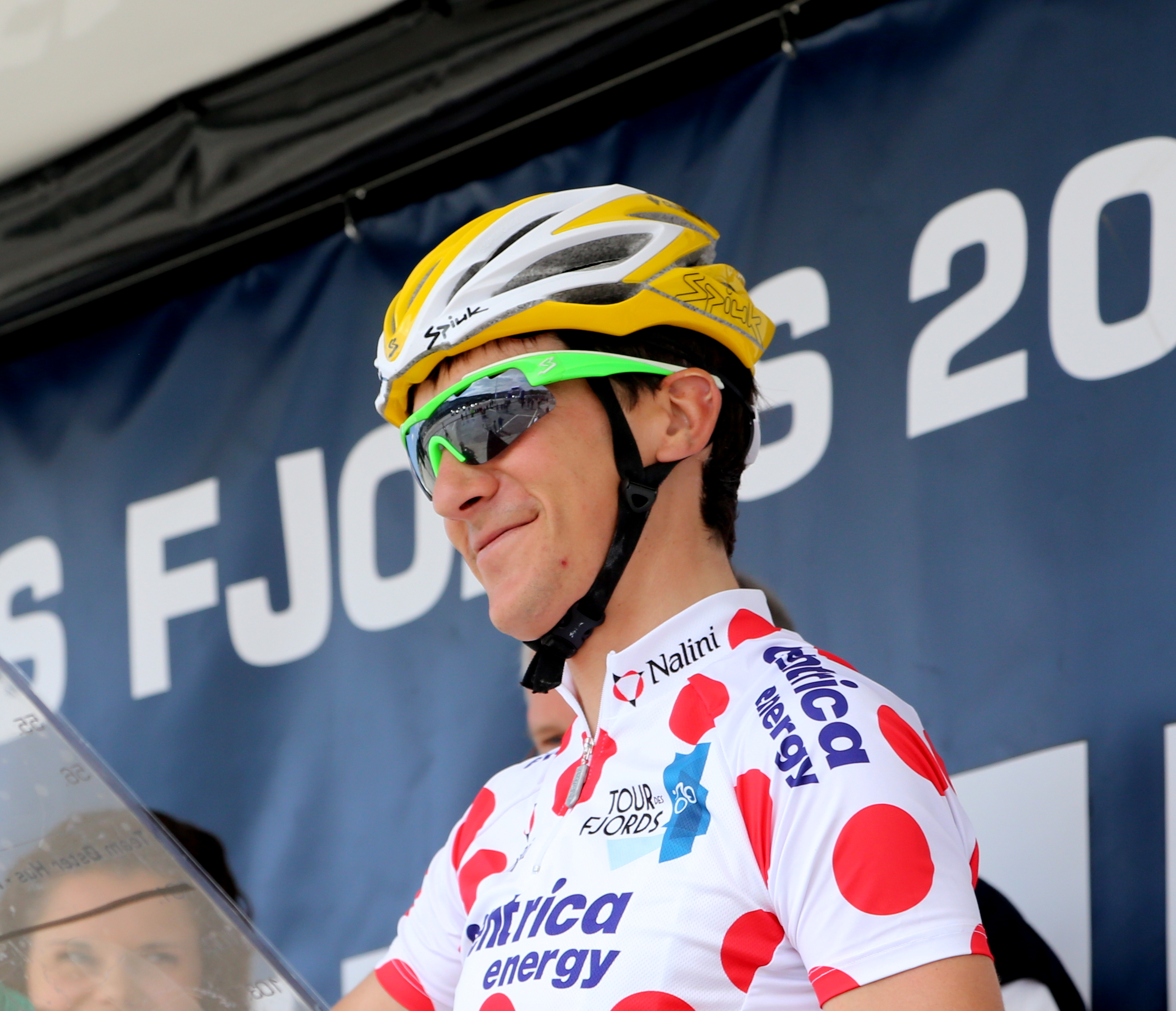 Amets Txurruka har klatretrøyen etter 3. etappe under tour des Fjords 2014